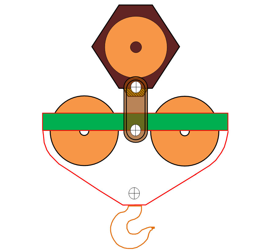 Крюковая подвеска кранов КБ-674